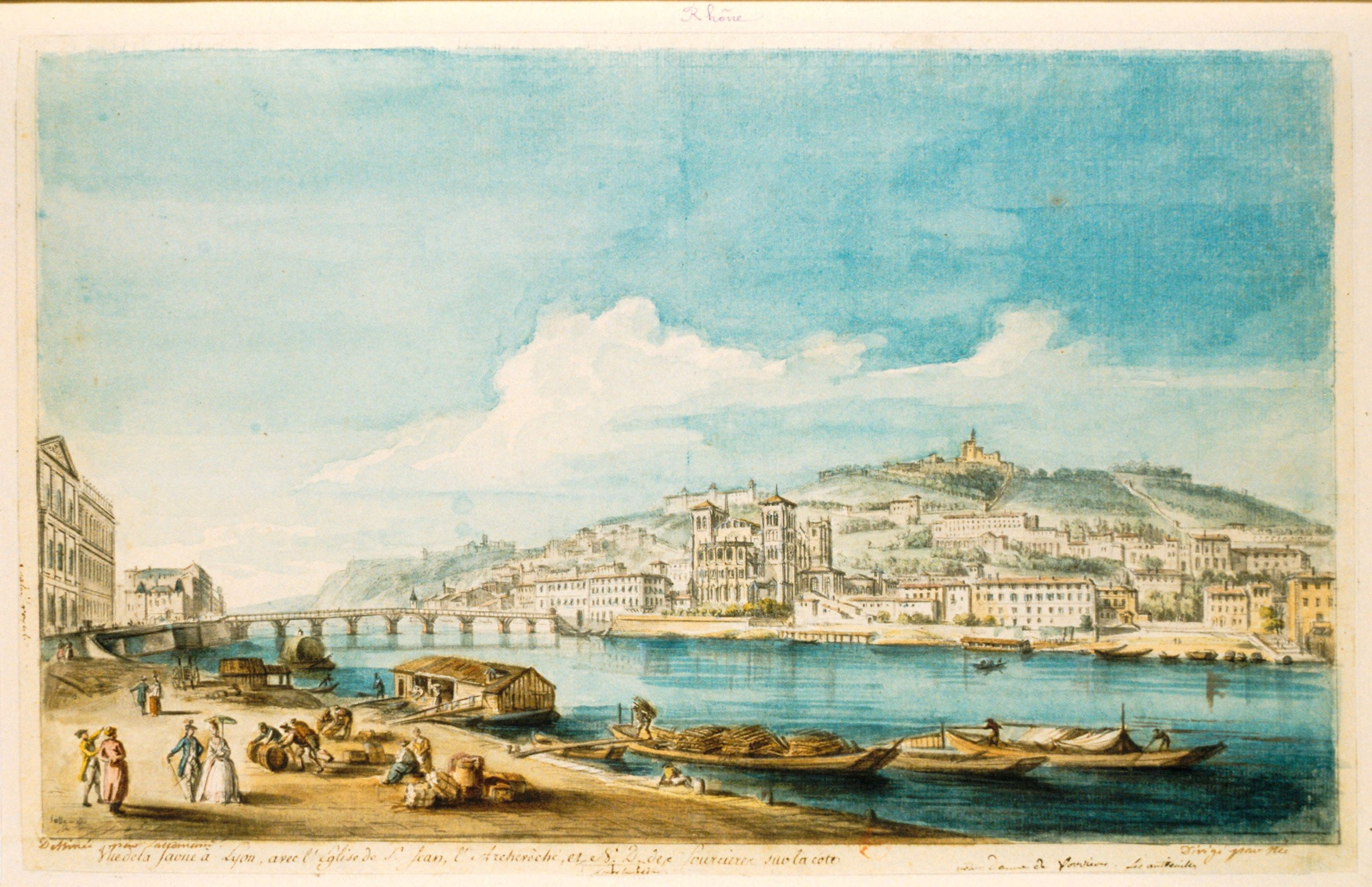 Lyon la Sâone et Fourvière